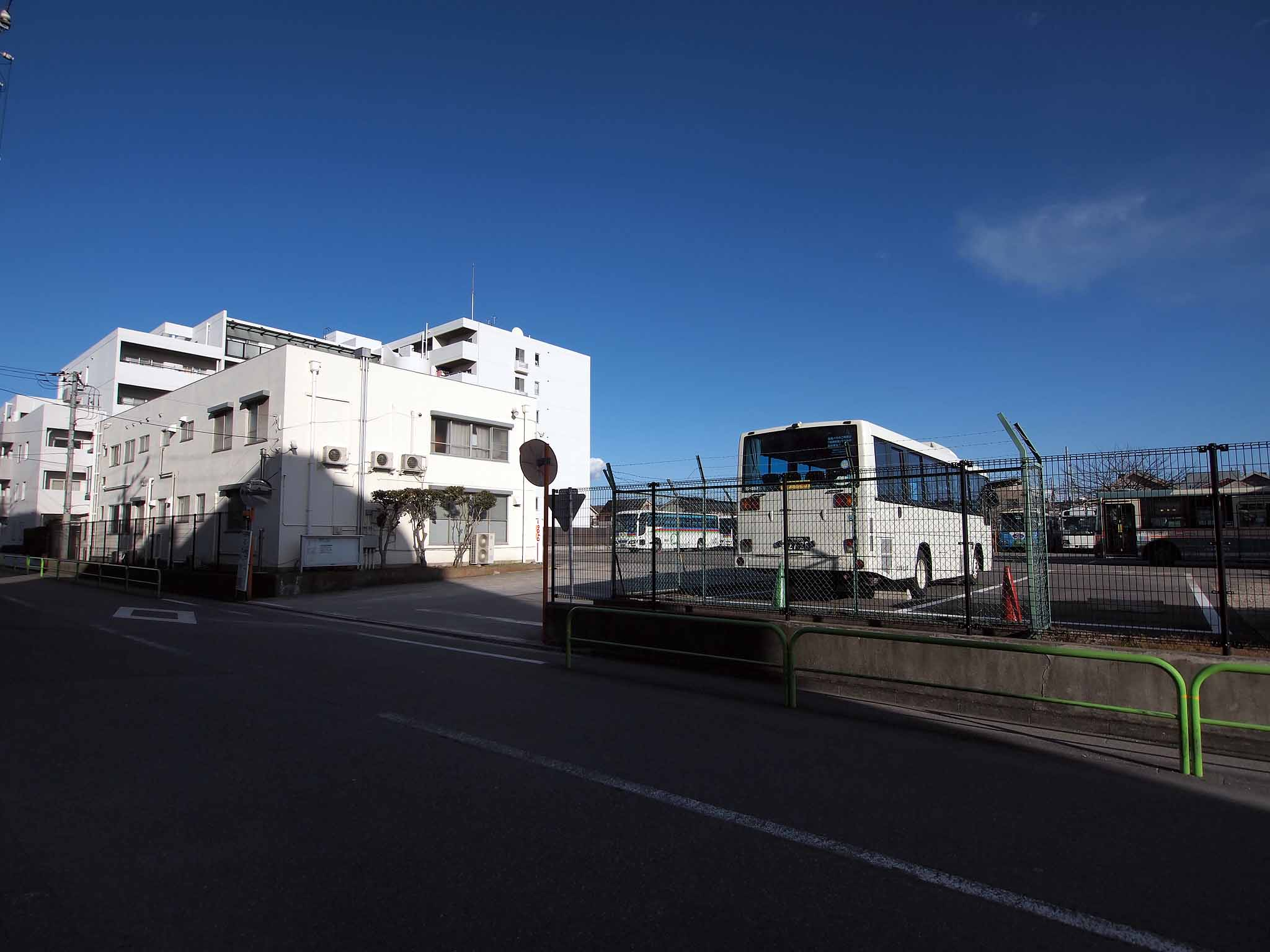 練馬区高野台にある西武観光バス練馬営業所。元々は西武バス高野台営業所で、西武総合企画高野台営業所と伊豆箱根バス東京練馬営業所も入居する。